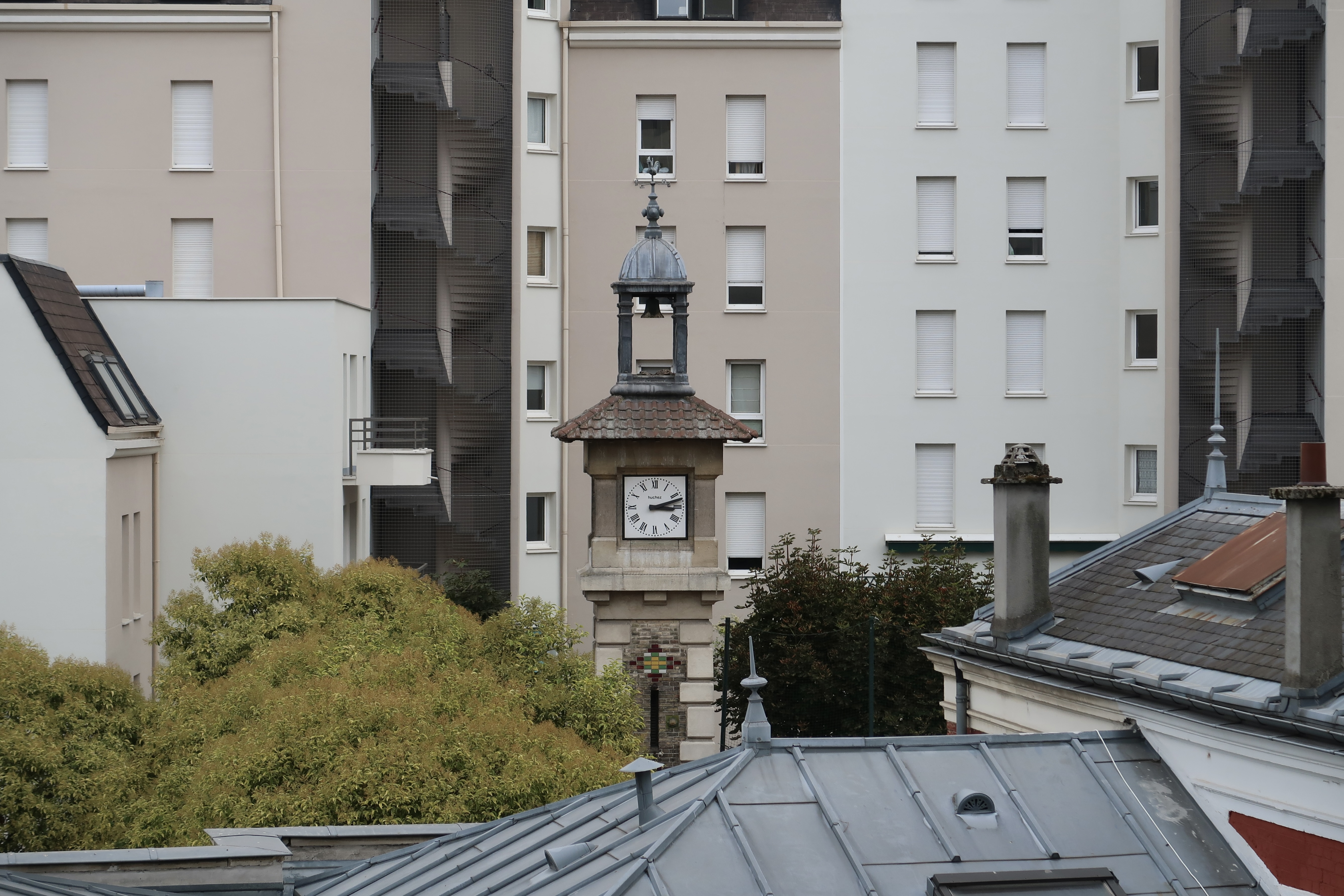 Beffroi de l'école élémentaire Jules-Ferry à Suresnes, 12 rue Jules-Ferry (Hauts-de-Seine).